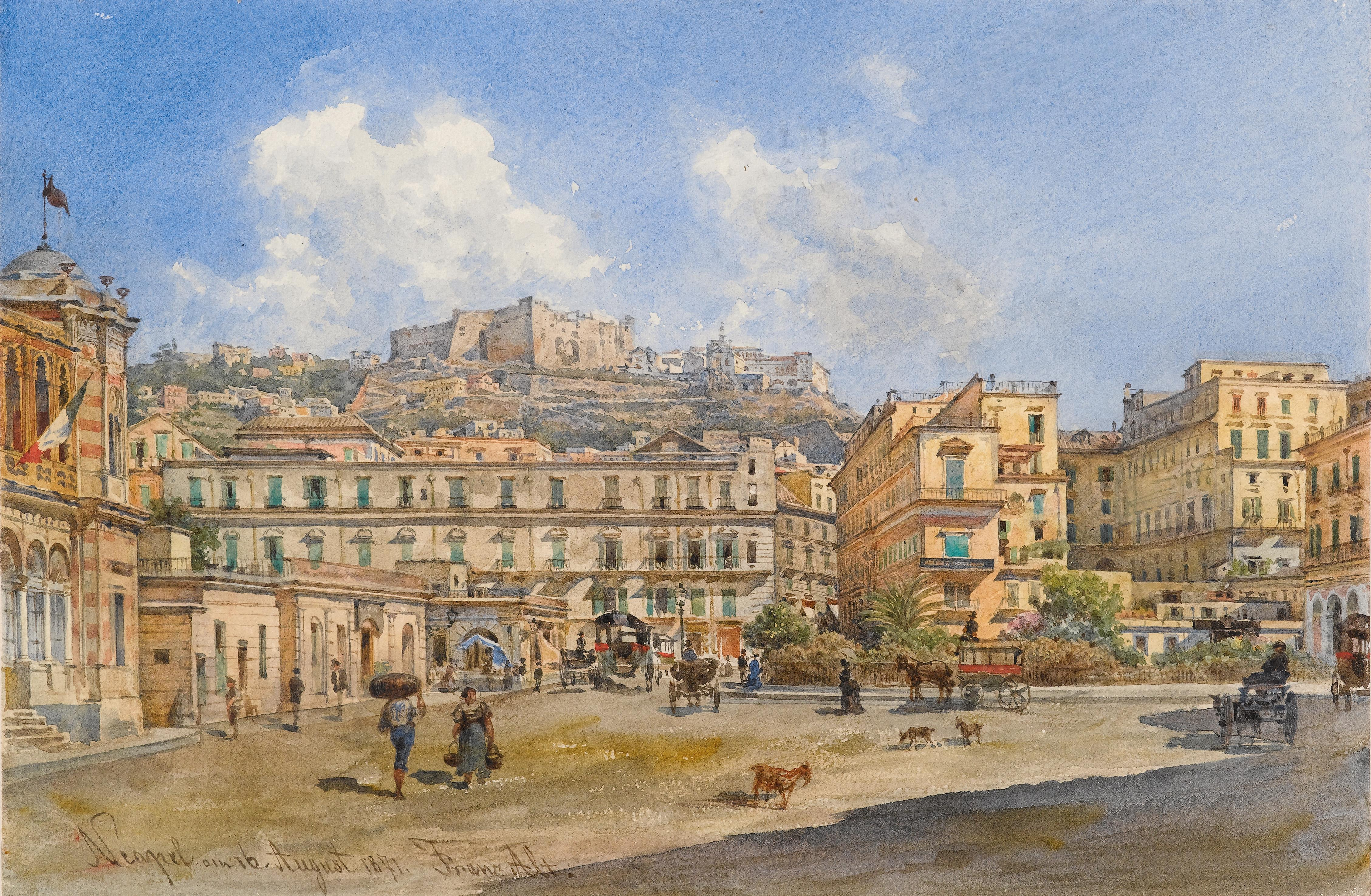 Blick auf die Piazza Vittoria, Neapel, signiert, datiert und bezeichnet Neapel am 16. August 1871. Franz Alt., Aquarell auf Papier, 19 x 28,5 cm